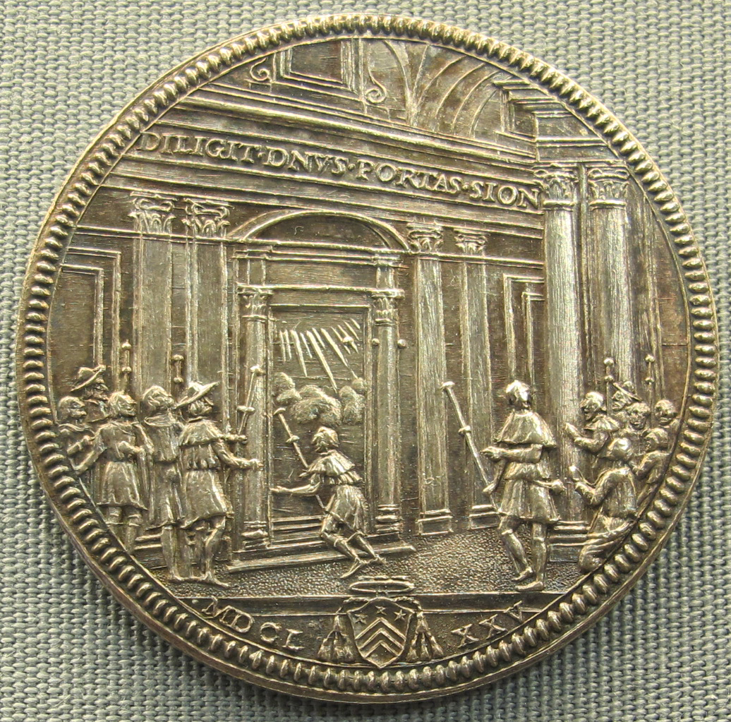 Stato della chiesa, scudo di clemente X, 1675